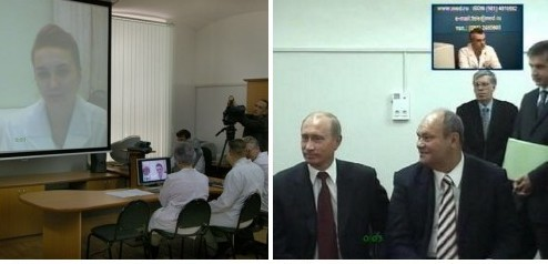 Сеанс Каменка-Пенза-Москва наблюдают президент РФ В.В.Путин, губернатор В.К.Бочкарёв, руководитель проекта В.И.Шеляпин, министр здравоохранения РФ М.Ю.Зурабов